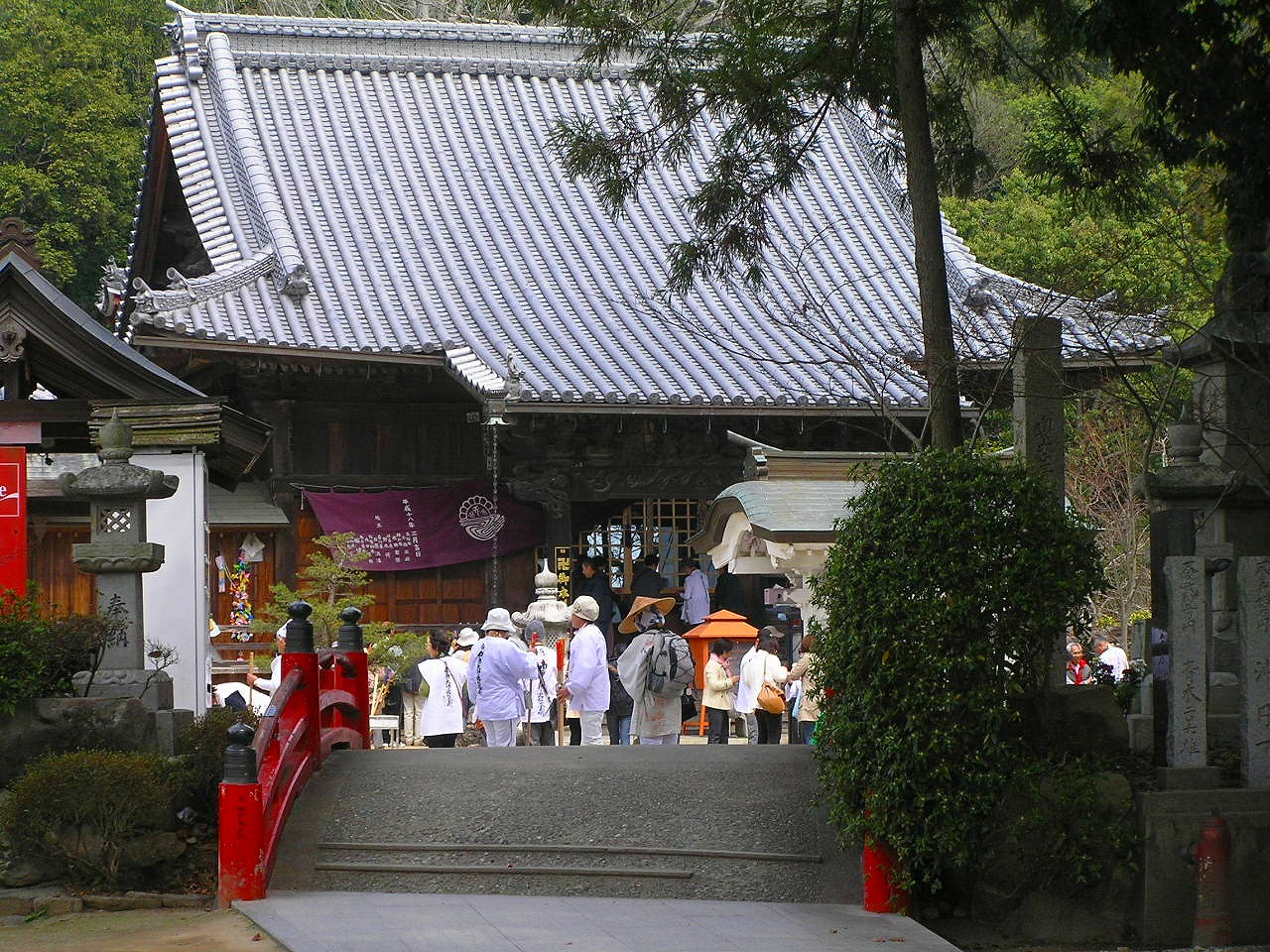 3番金泉寺本堂